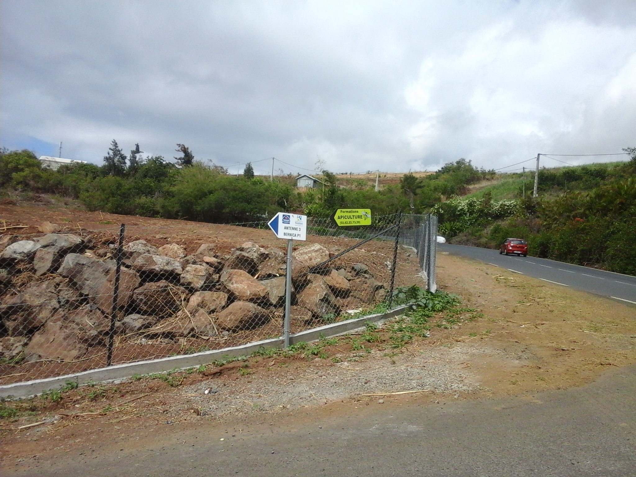 Pour se rendre à Kazkabar à Bois-rouge Saint-Paul , direction Maïdo, puis Bellemène et prendre chemin Antenne 3